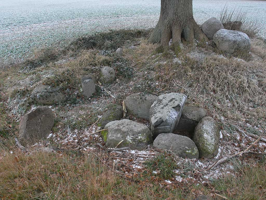 Hünenbett Olpenitz